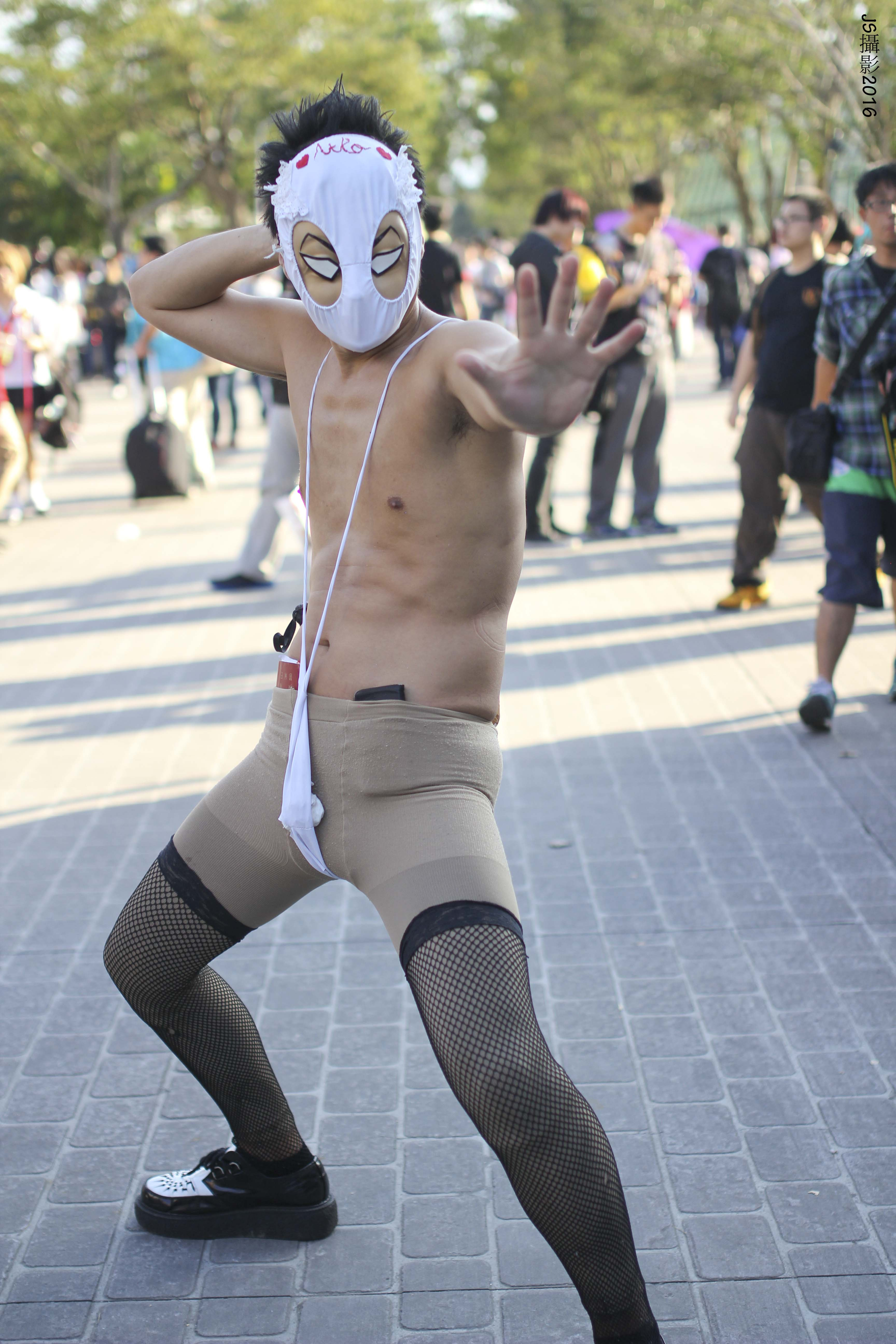 第42屆台灣同人誌販售會，《瘋狂假面》色丞狂介cosplayer。